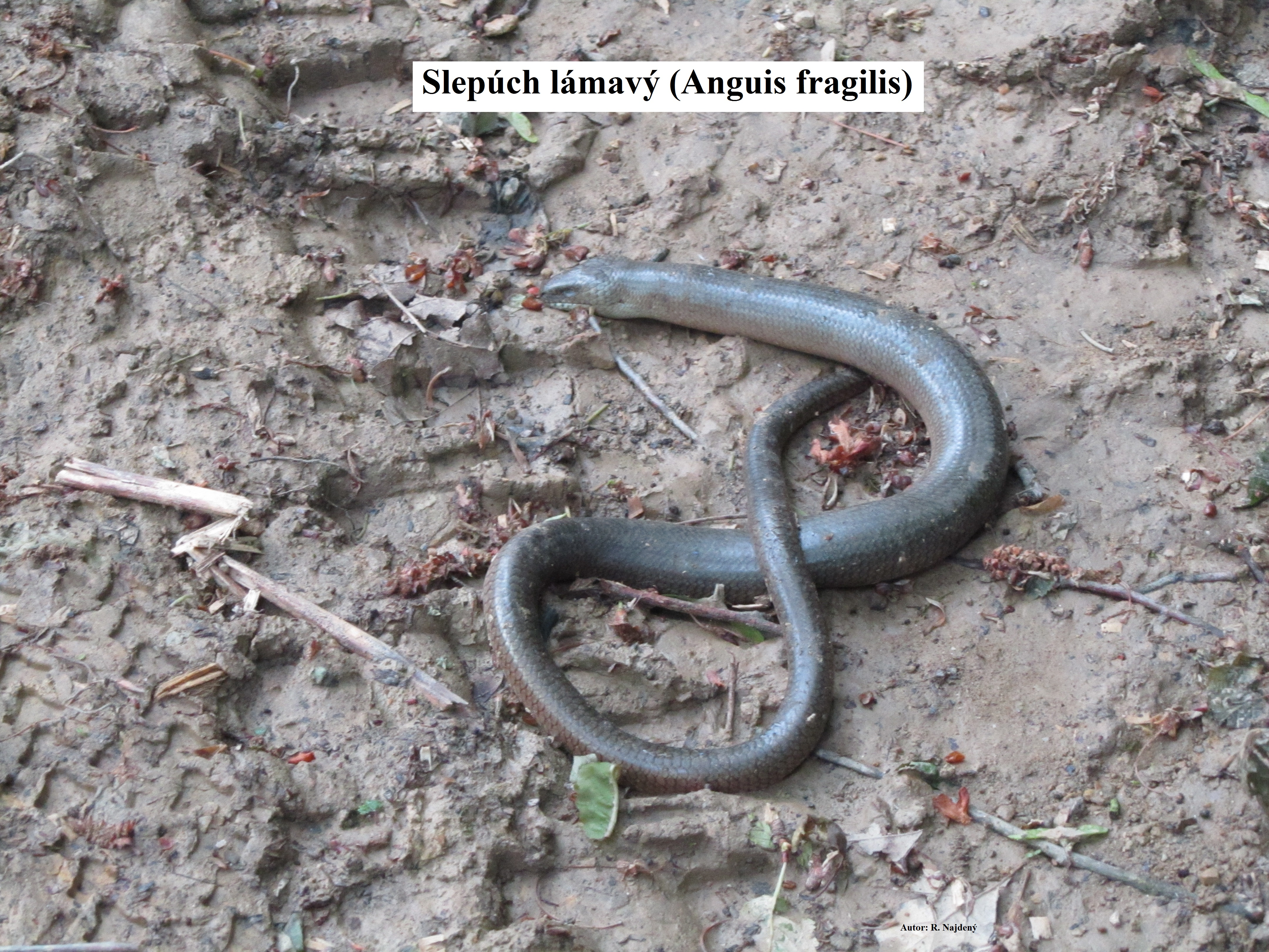 slepúch lámavý (Anguis fragilis)